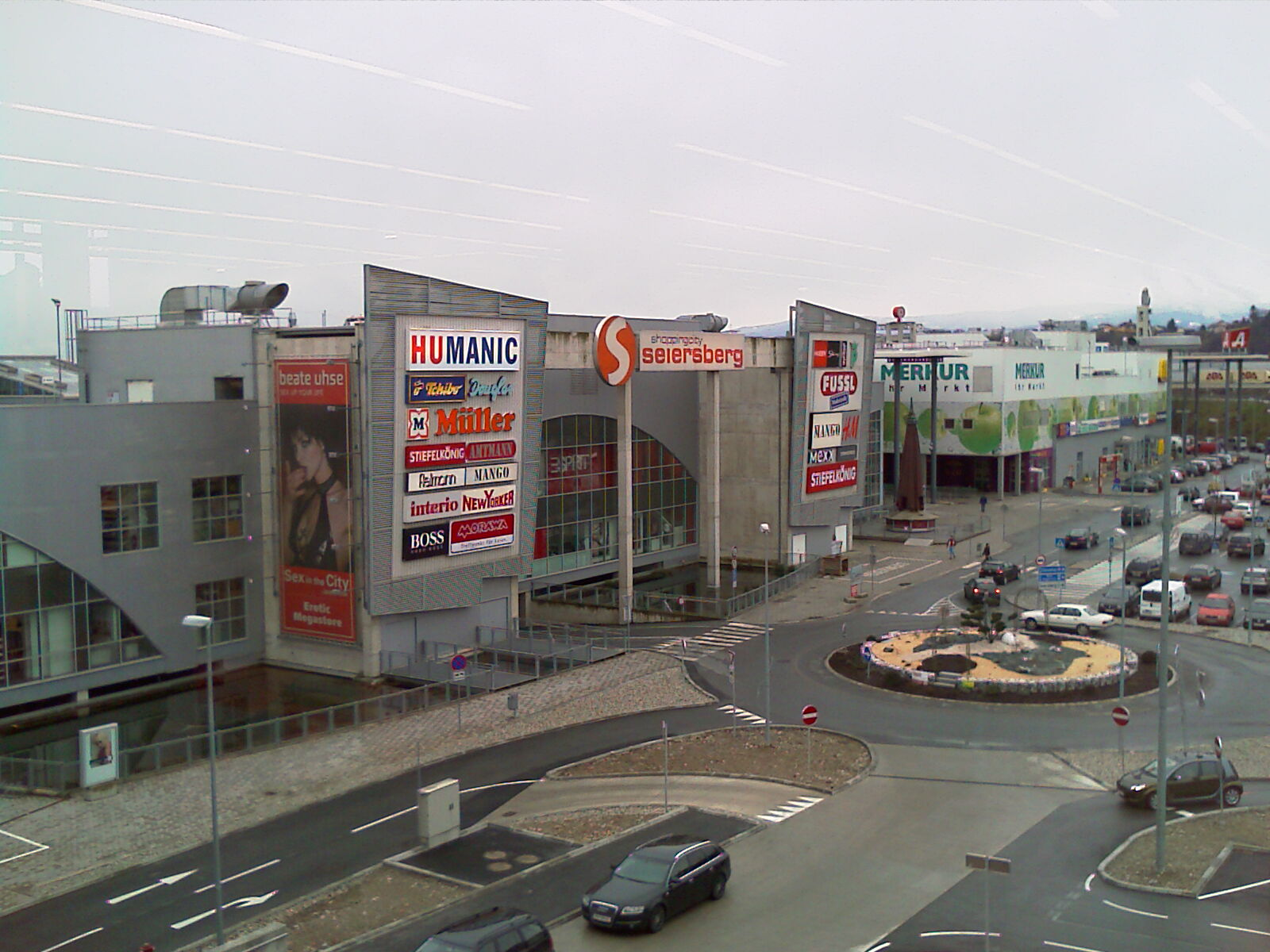 Die Shopping City Seiersberg im Süden von Graz, in Seiersberg